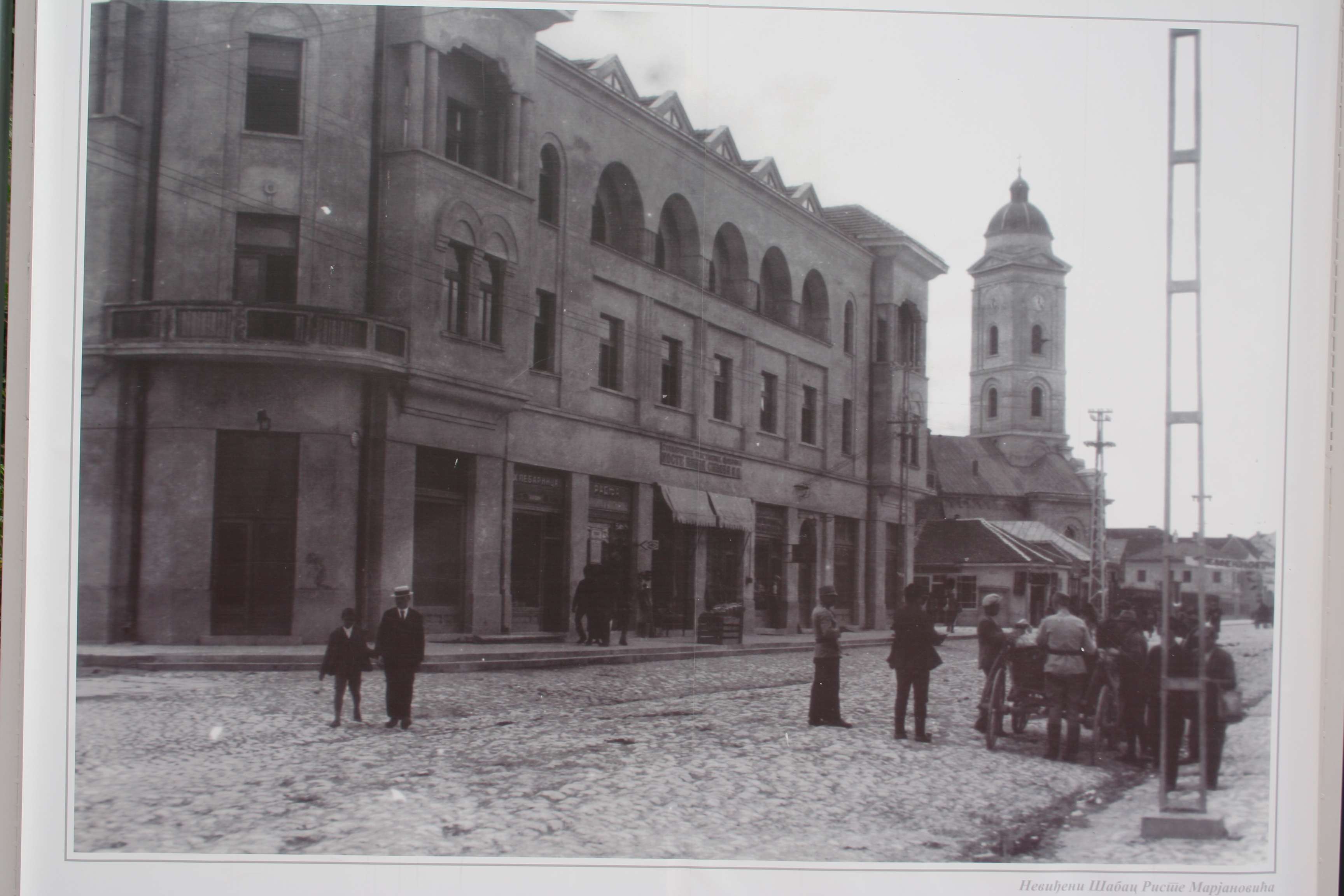 Izložba slika starog Šapca, autora Riste Marjanovića na otvorenom